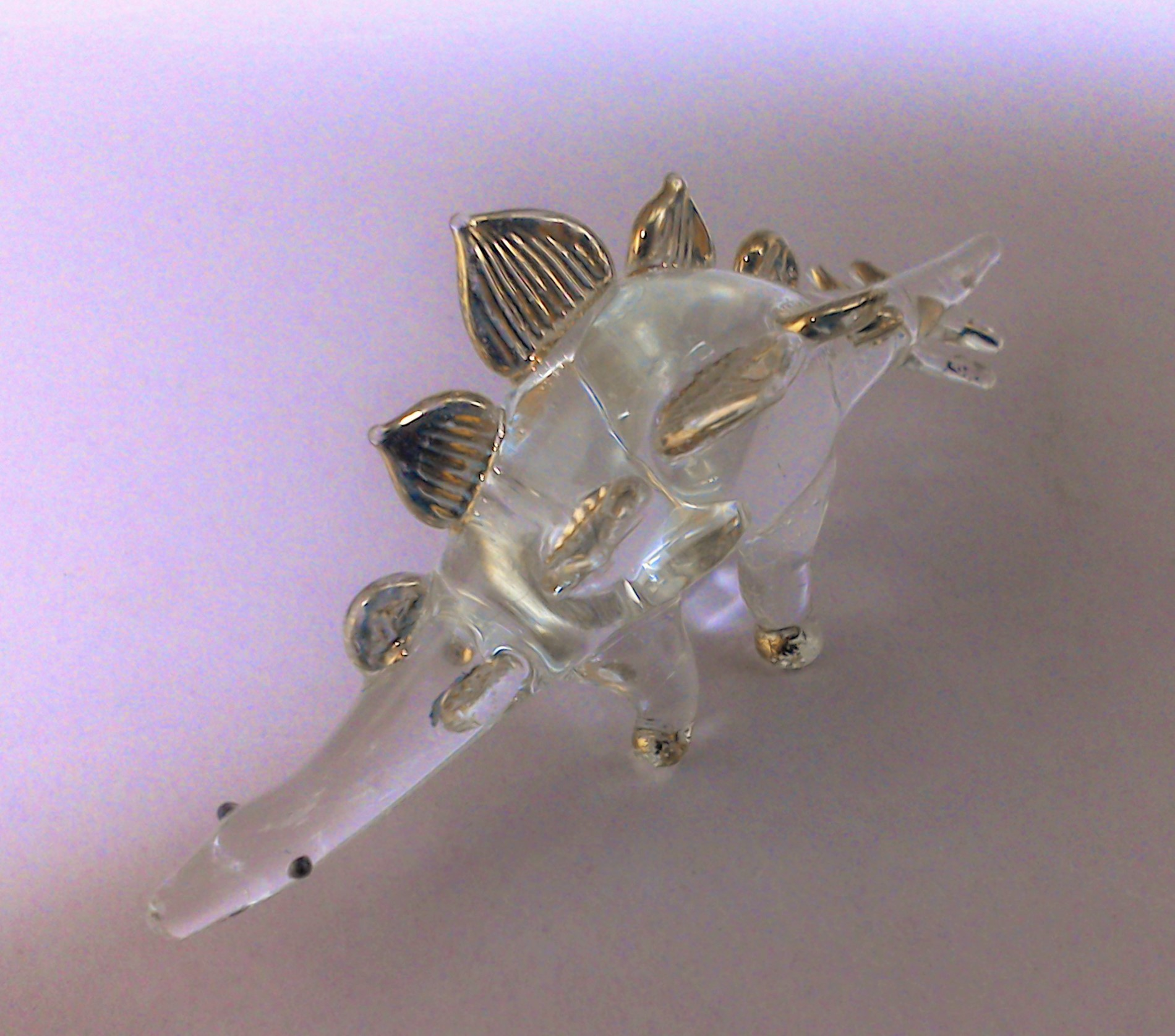 ガラス細工の一例